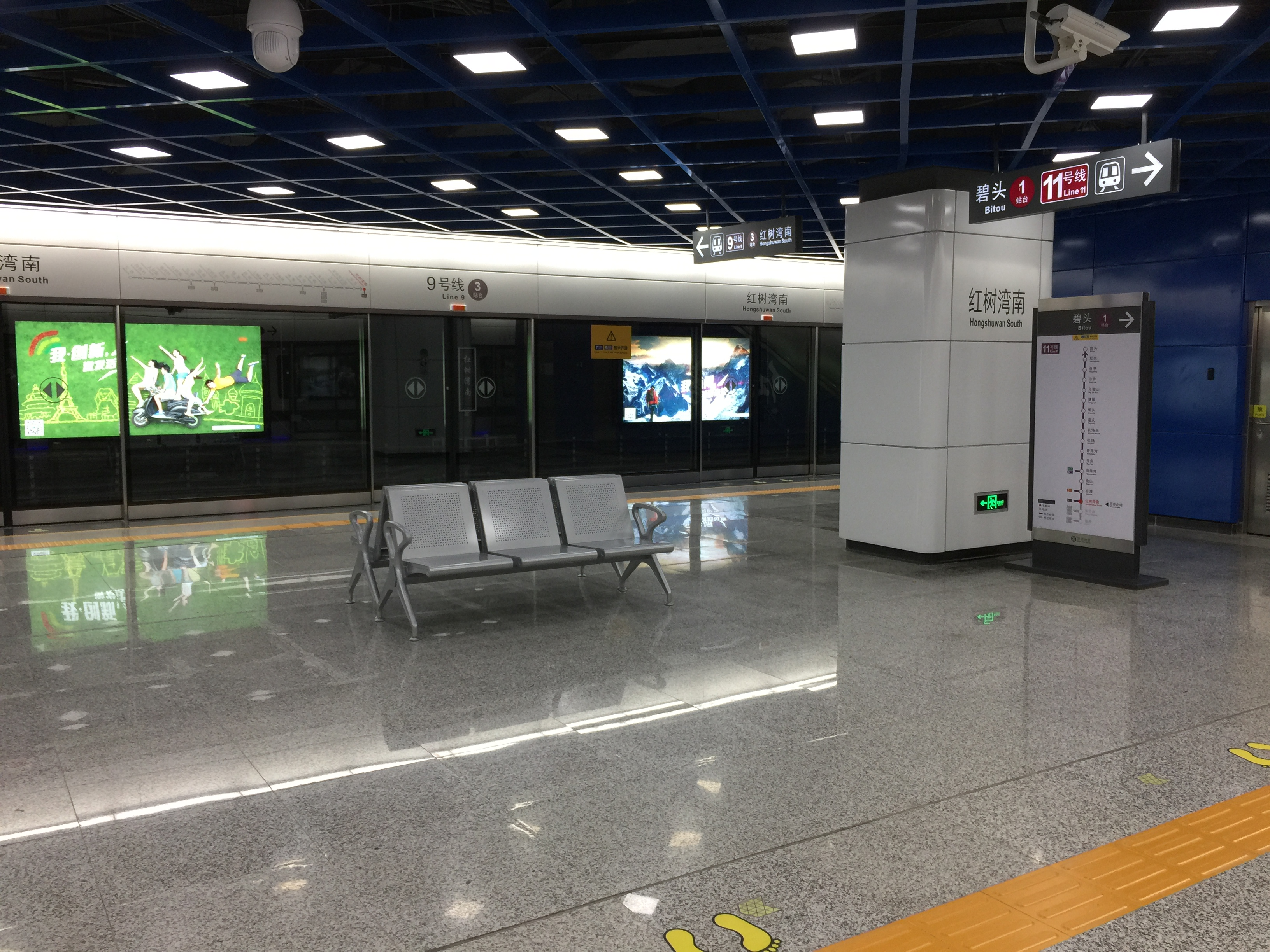 Shenzhen Metro Line 9 and Line 11